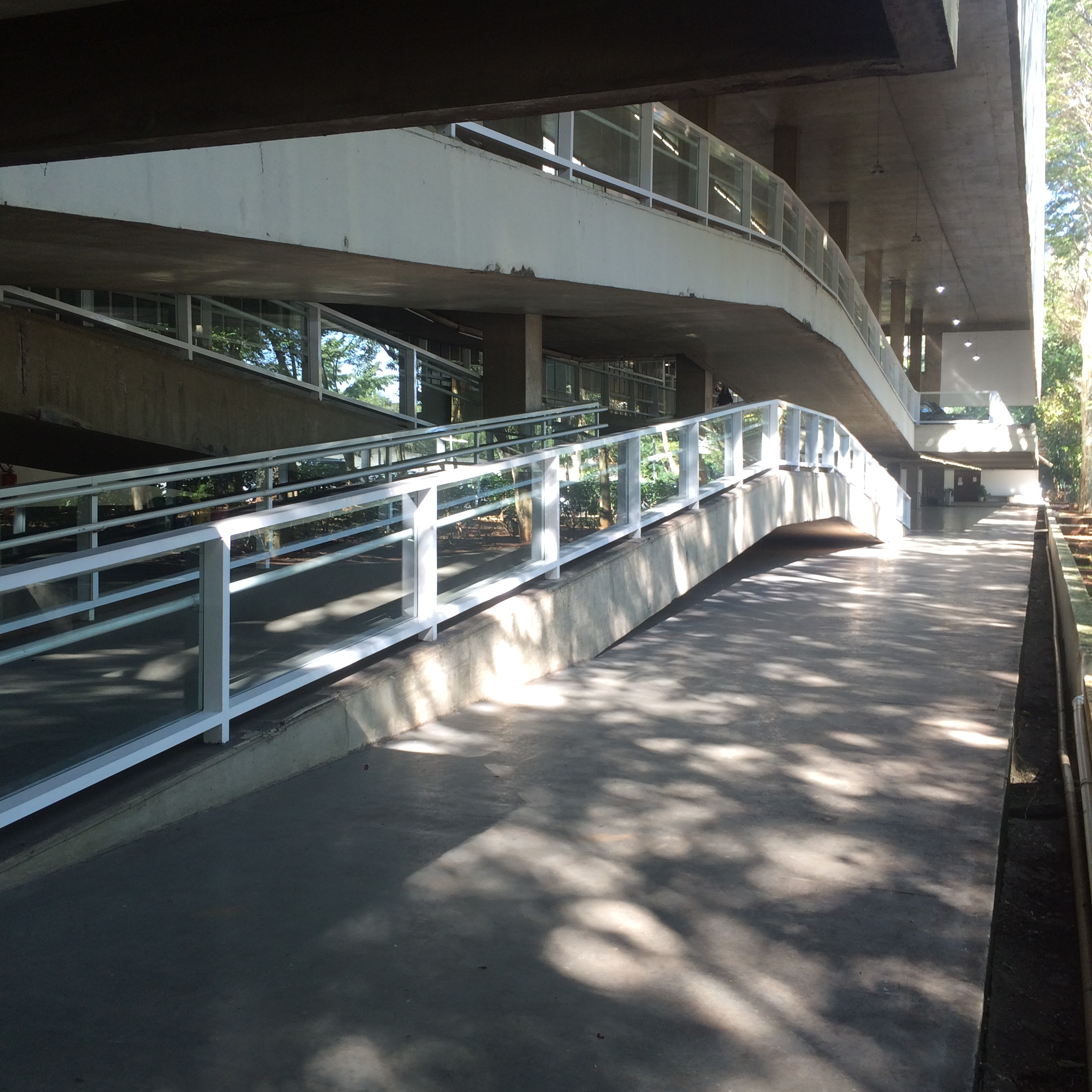 Entrada do Museu da Polícia Civil do Estado de São Paulo.